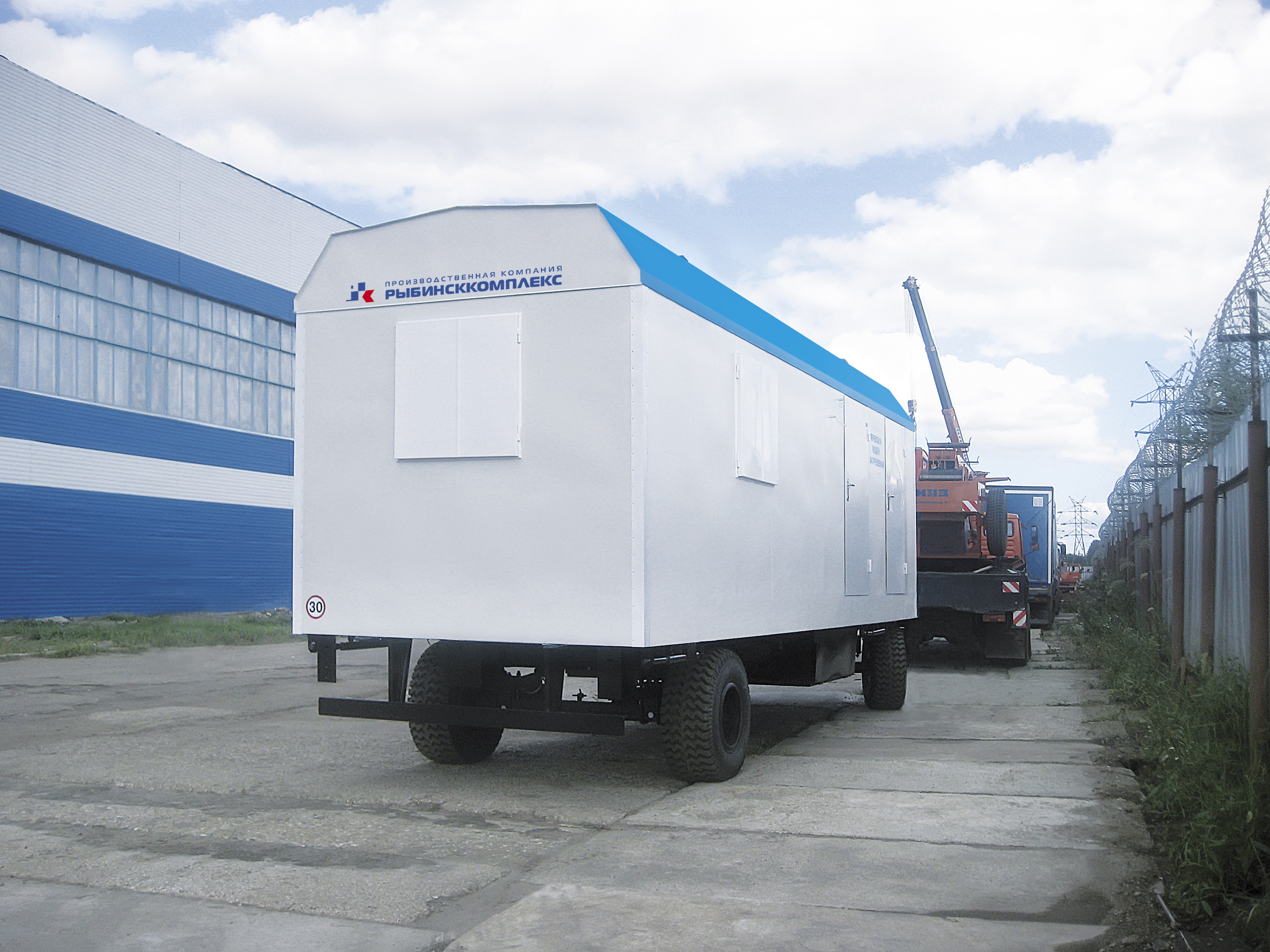 Вагон-дом на шасси производства компании "Рыбинсккомплекс"